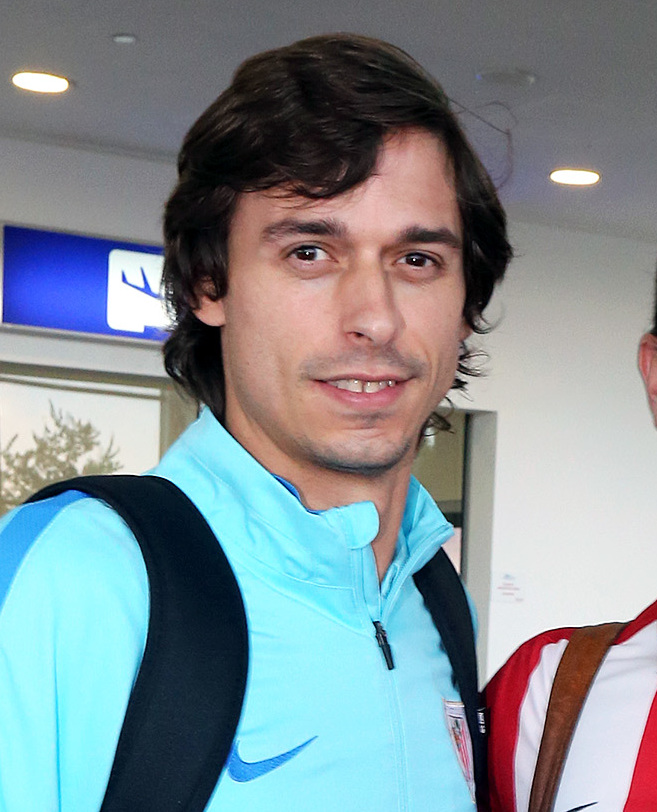 Ander Iturraspe con un un simpatizante del equipo.